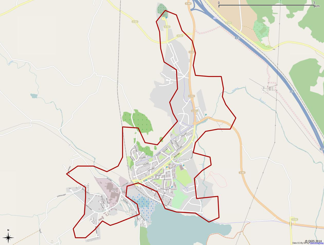 Tätorten Åkers styckebruks gränser 1990 enligt Atlas över rikets indelningar 1992.